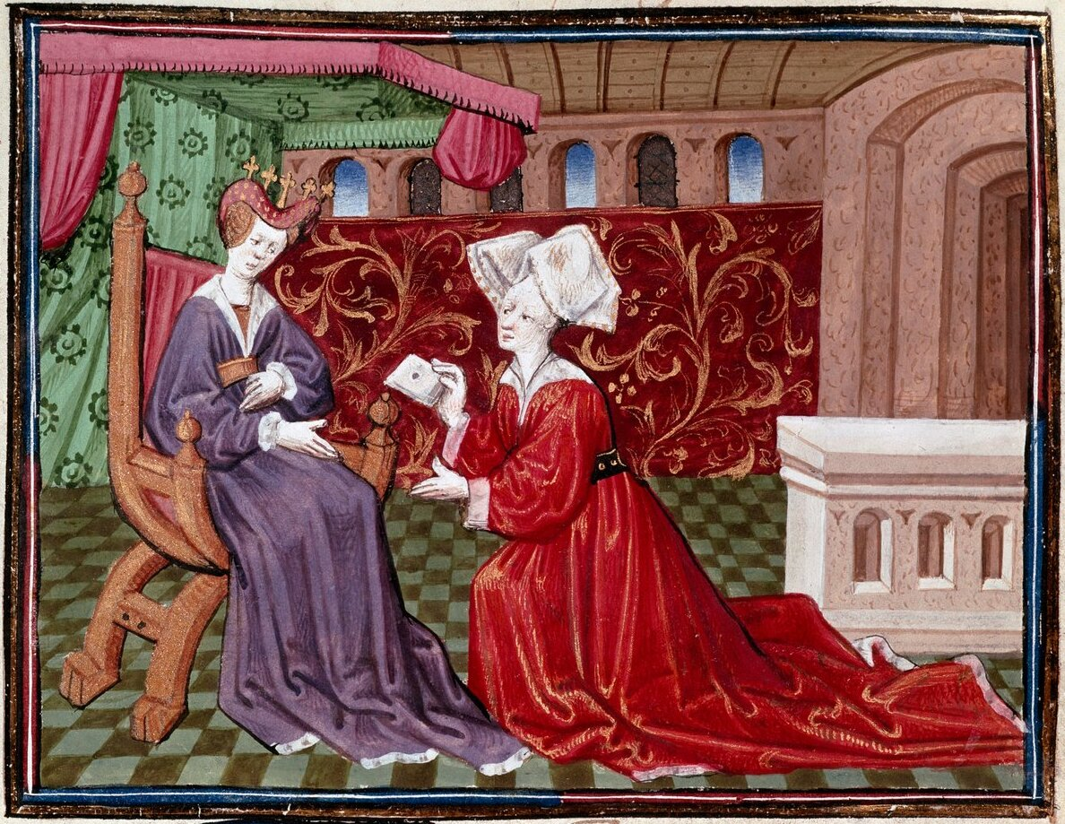 Roman de Tristan by Thomas of Britain